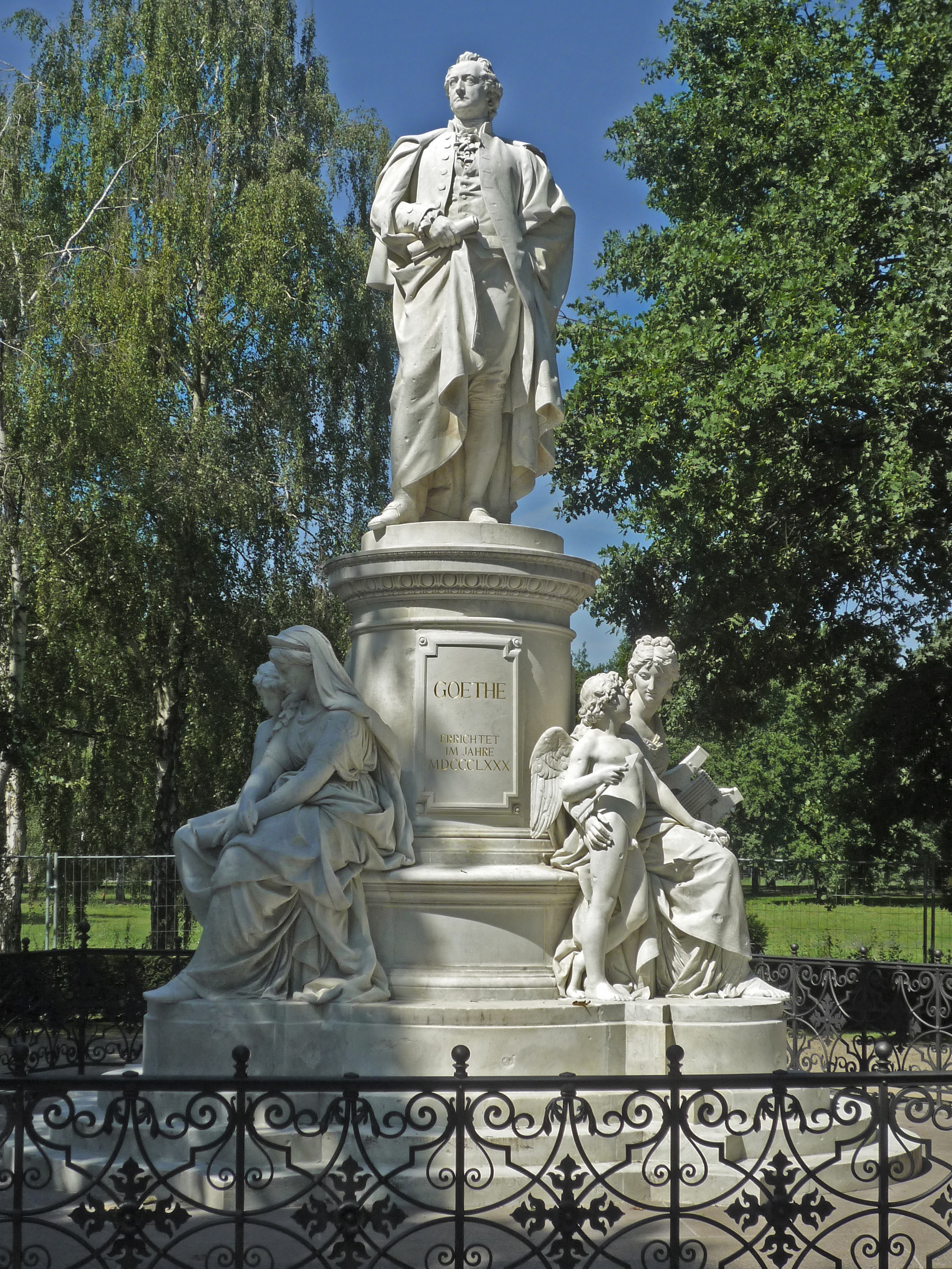 Berlin, Tiergarten. Goethe-Denkmal von Fritz Schaper, errichtet 1880.